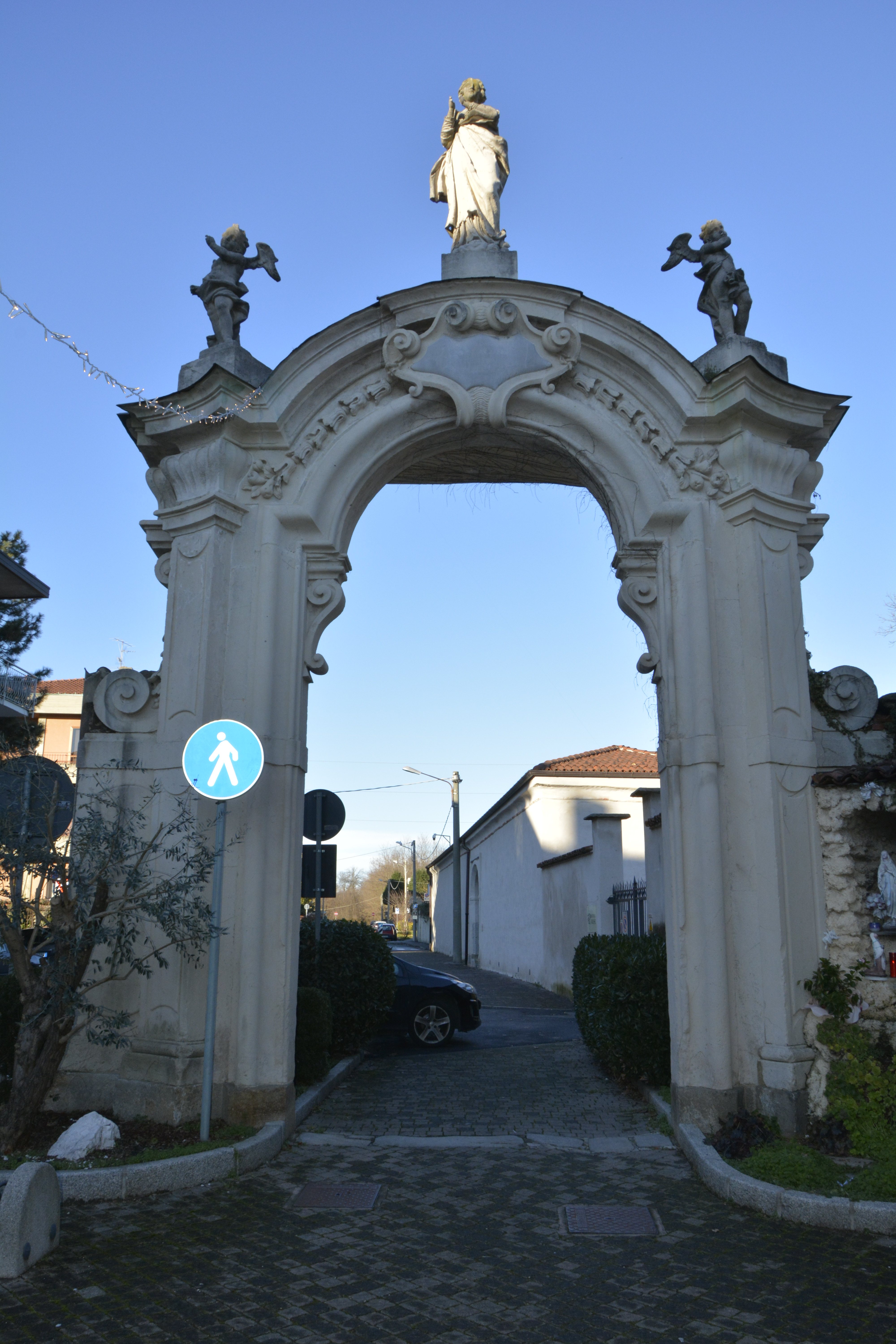 L'arco dell'antico ingresso del monastero di Cairate, in provincia di Varese.